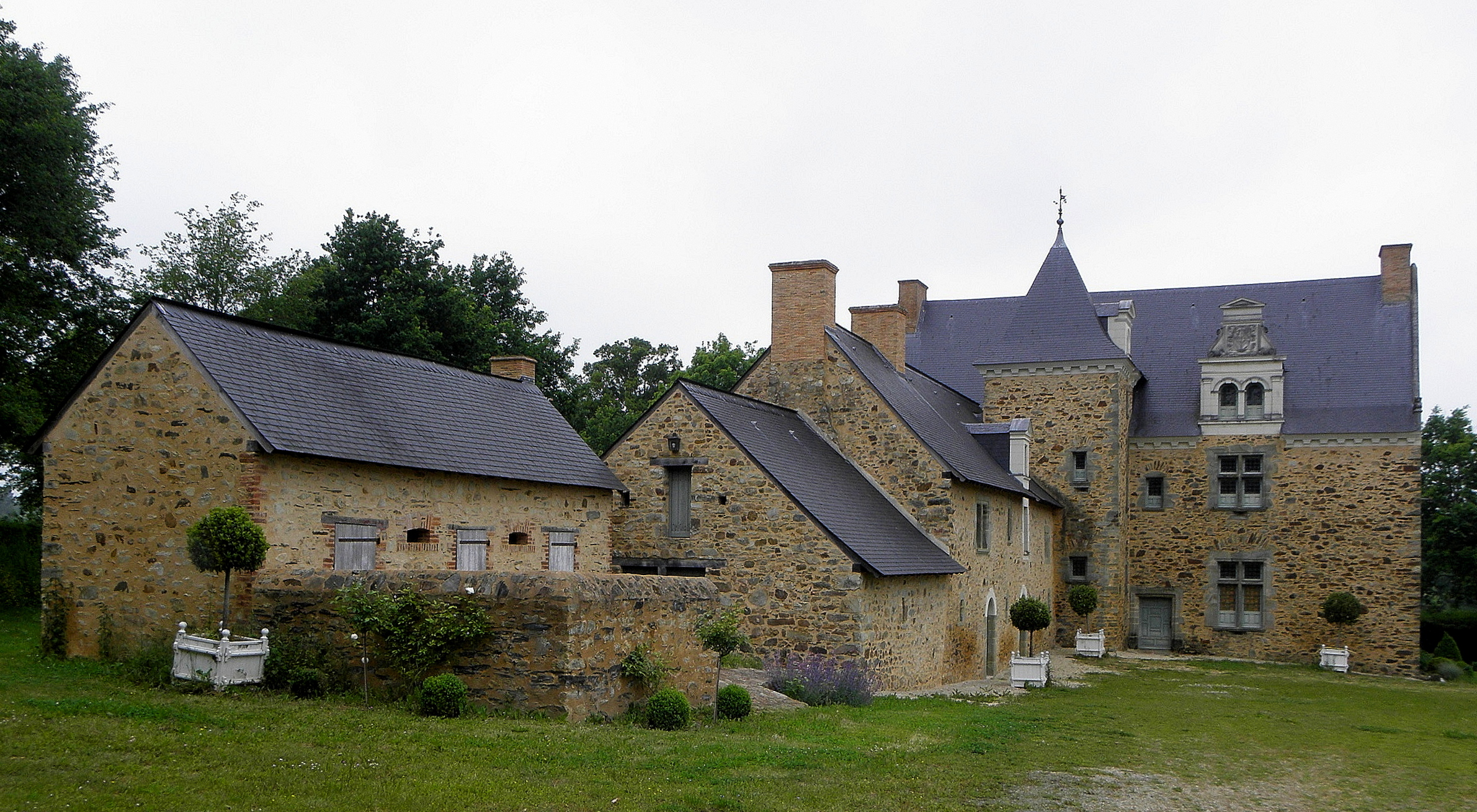 Manoir de la Joubardière en Saint-Martin-du-Limet (53).